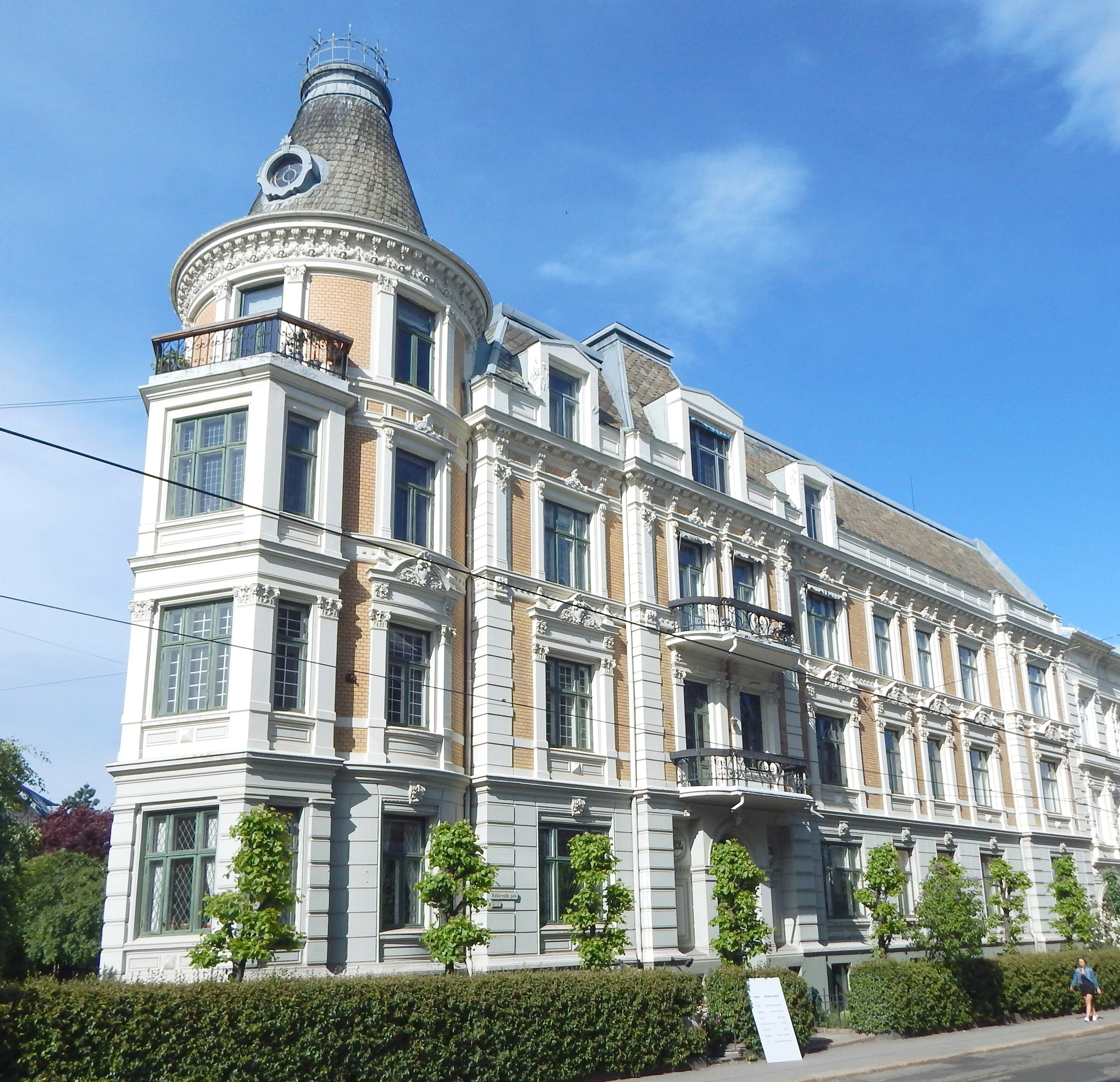 Riddervolds gate 9 (arkitekt: Olaf Boye)